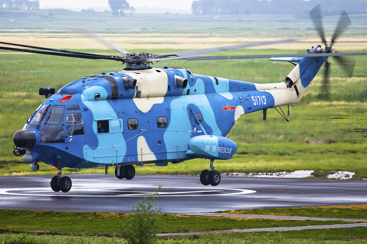 Открытие лётной программы международного конкурса «Авиадартс» АрМИ-2017 (полигон Тайпинчуань, КНР)